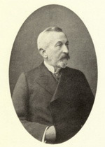 Bernhard Howaldt (* 11. September 1850 in Kiel; † 7. März 1908 ebd.) war ein norddeutscher Unternehmer der Gründungszeit in den Bereichen des Maschinen-, Schiff- und Anlagenbaus und förderte maßgeblich die Industrialisierung der Stadt Kiel.